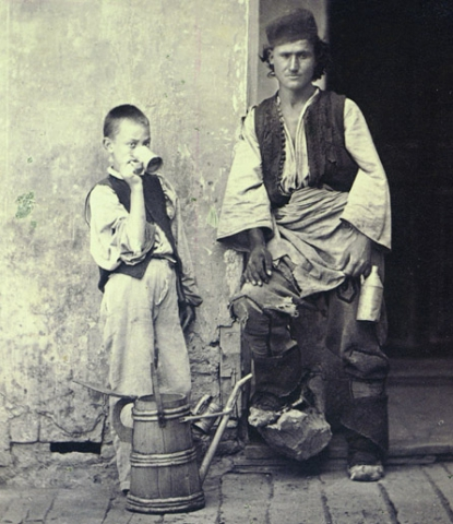 Bragagiu cu ucenic